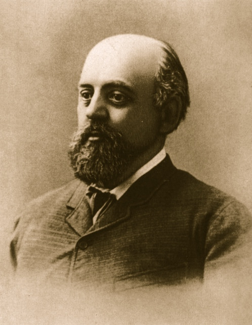 Савва Мамонтов в период с 1875 до 1890